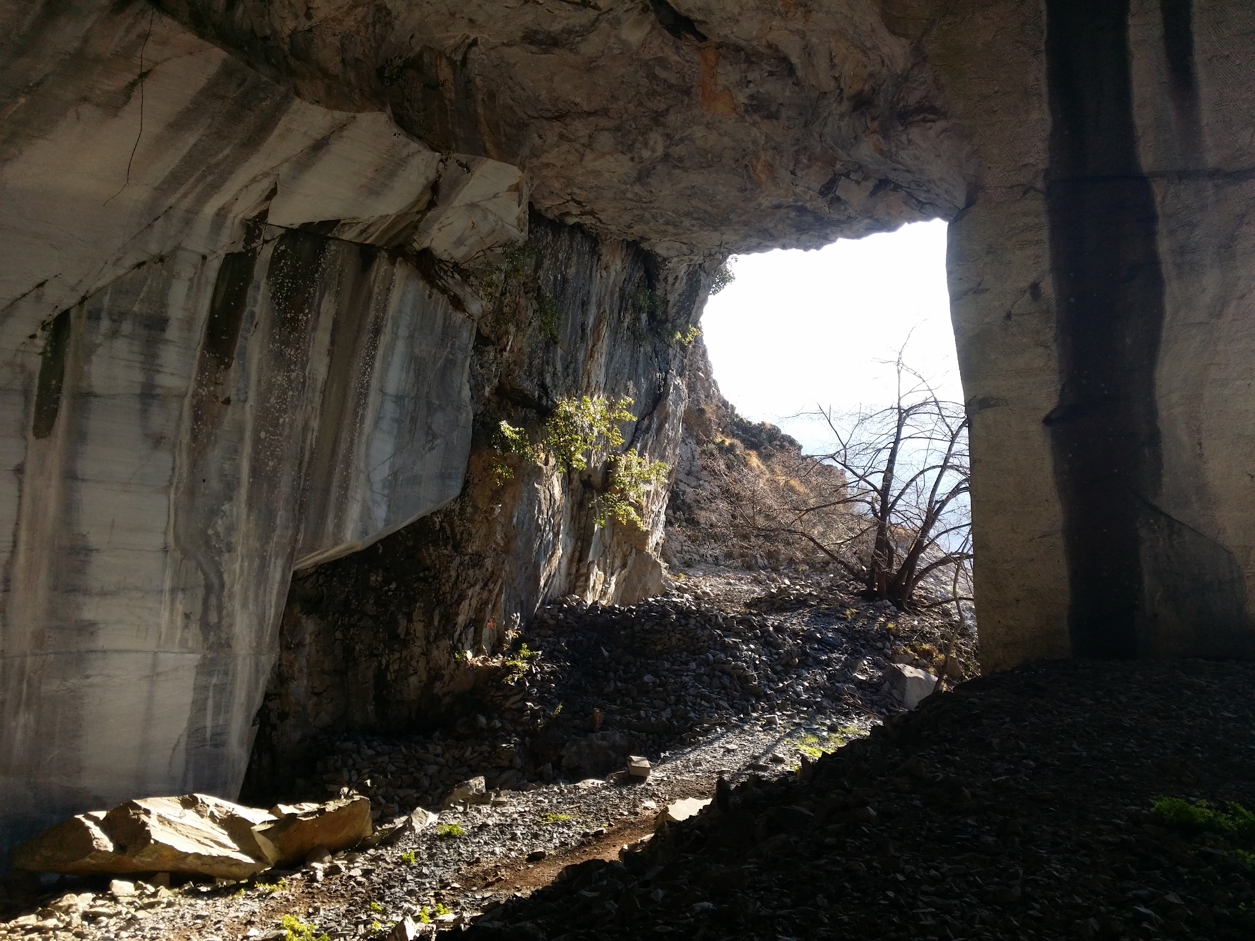 Una delle cave di marmo presenti ancora oggi a Retignano, Stazzema.